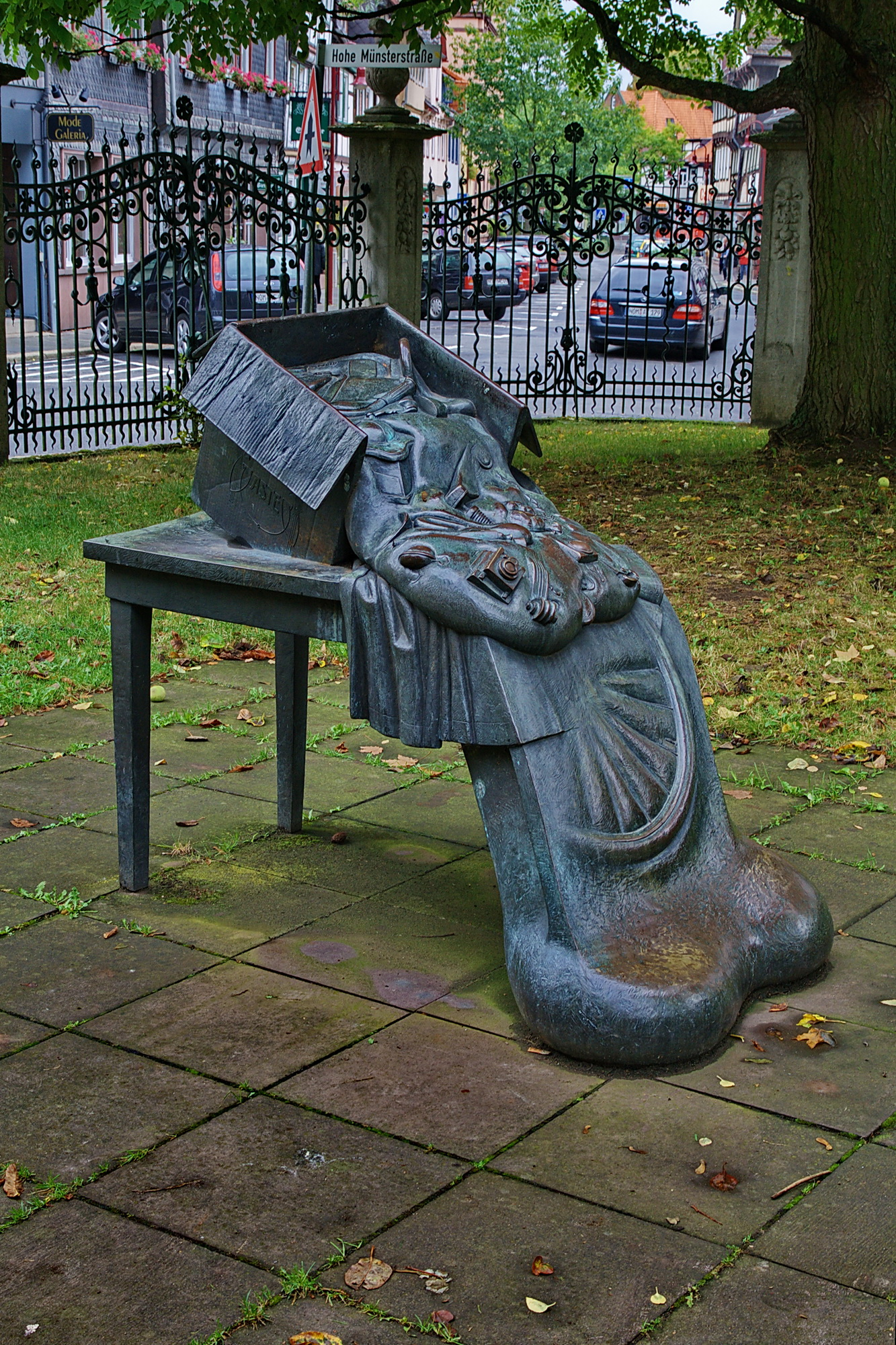 Stukenbrokskulptur im Stiftsgarten in Einbeck, Niedersachsen, Deutschland